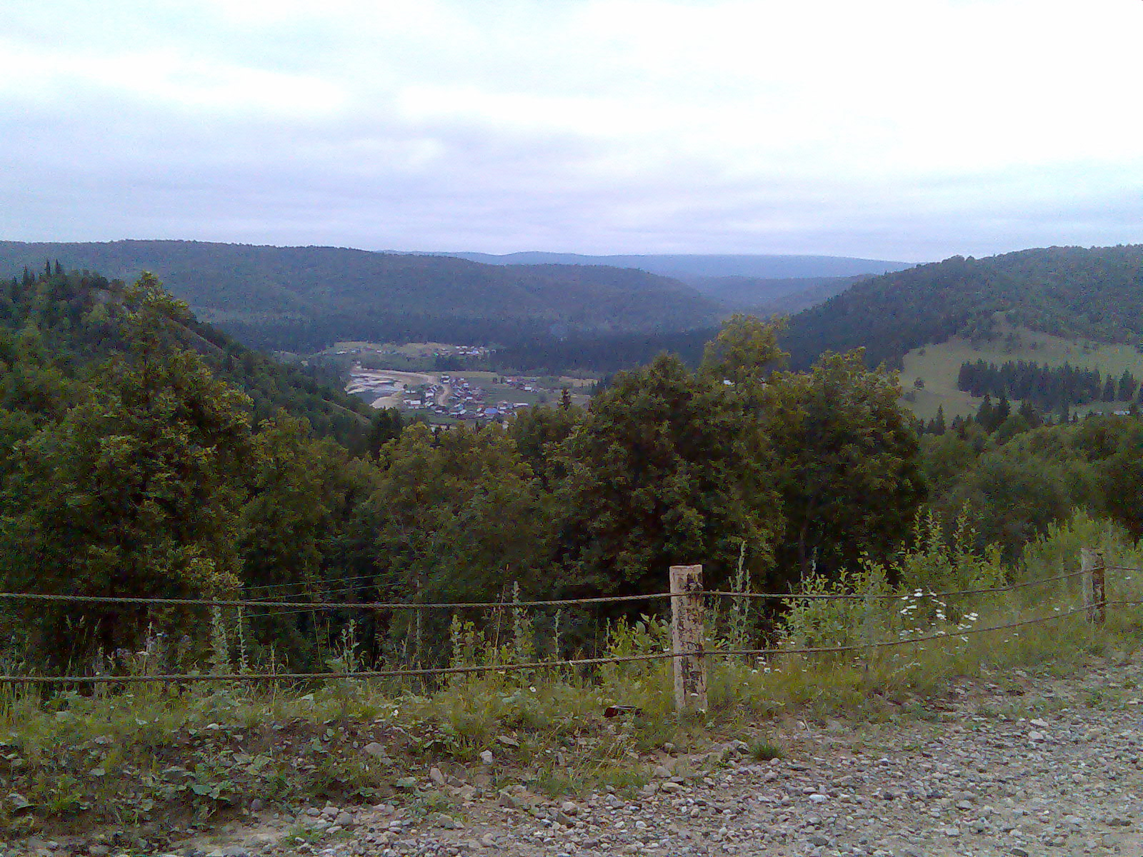 Вид на деревню Толпарово (с горы Карамалы)